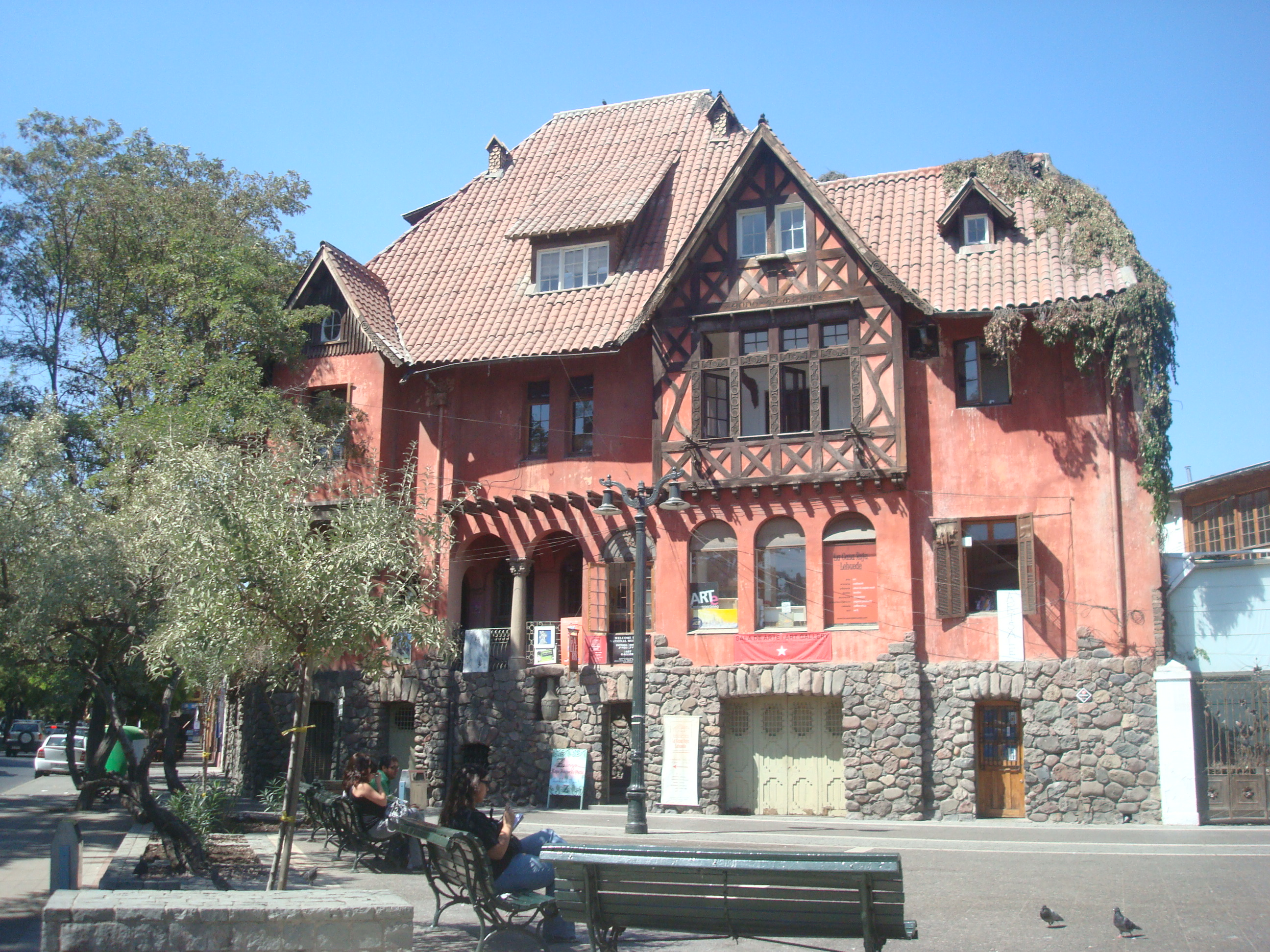 Castillo Lehuedé, Providencia, Santiago de Chile